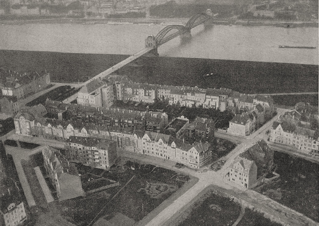 Oberkassel, jenseits der Rheinbrücke, aufgenommen aus dem Parseval-Luftschiff "Charlotte" zur Städteausstellung in Düsseldorf von Hoffotograf Julius Söhn, 1912